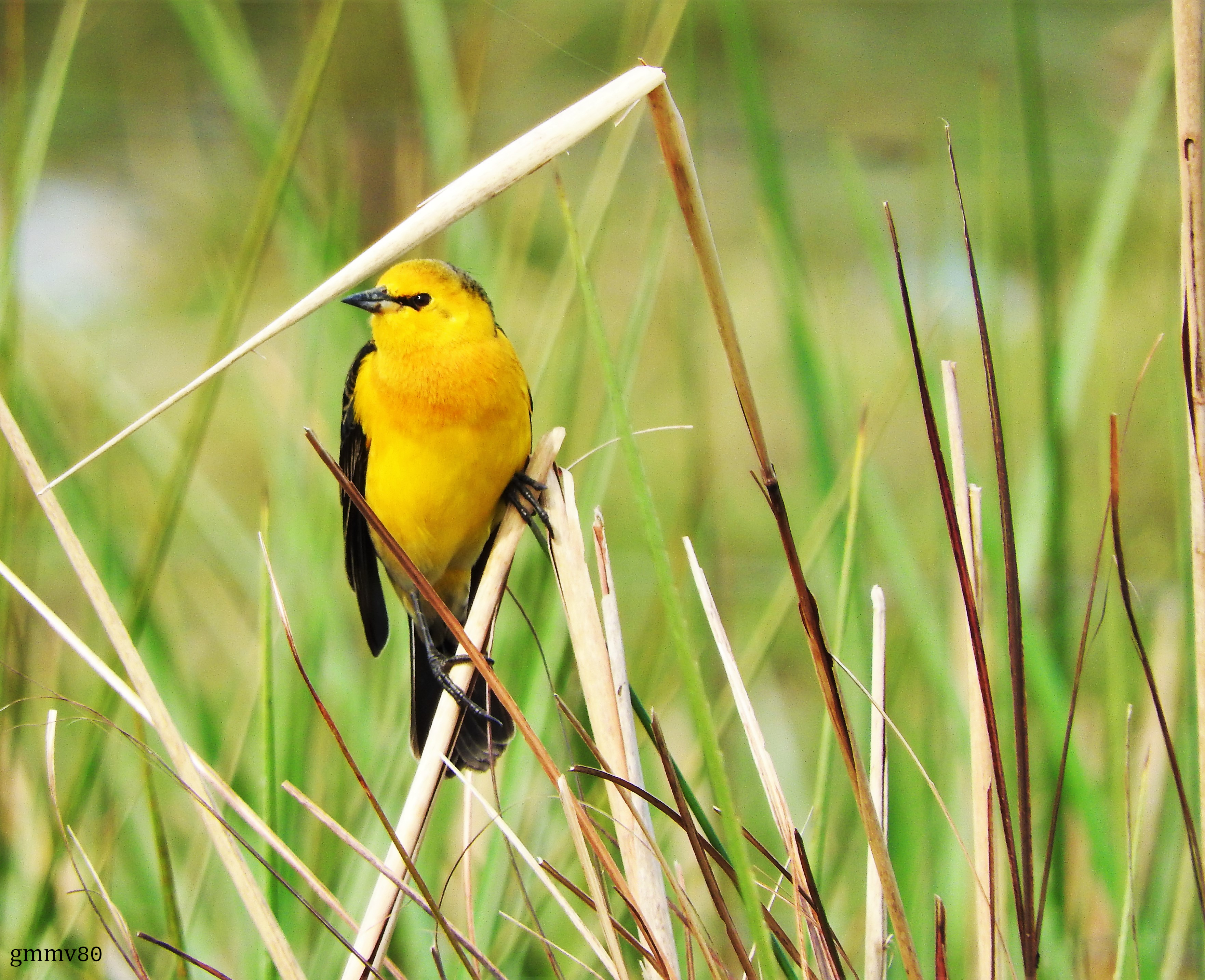 Individuo macho de Xanthopsar flavus en Bañado Los Indios, Rocha, Uruguay